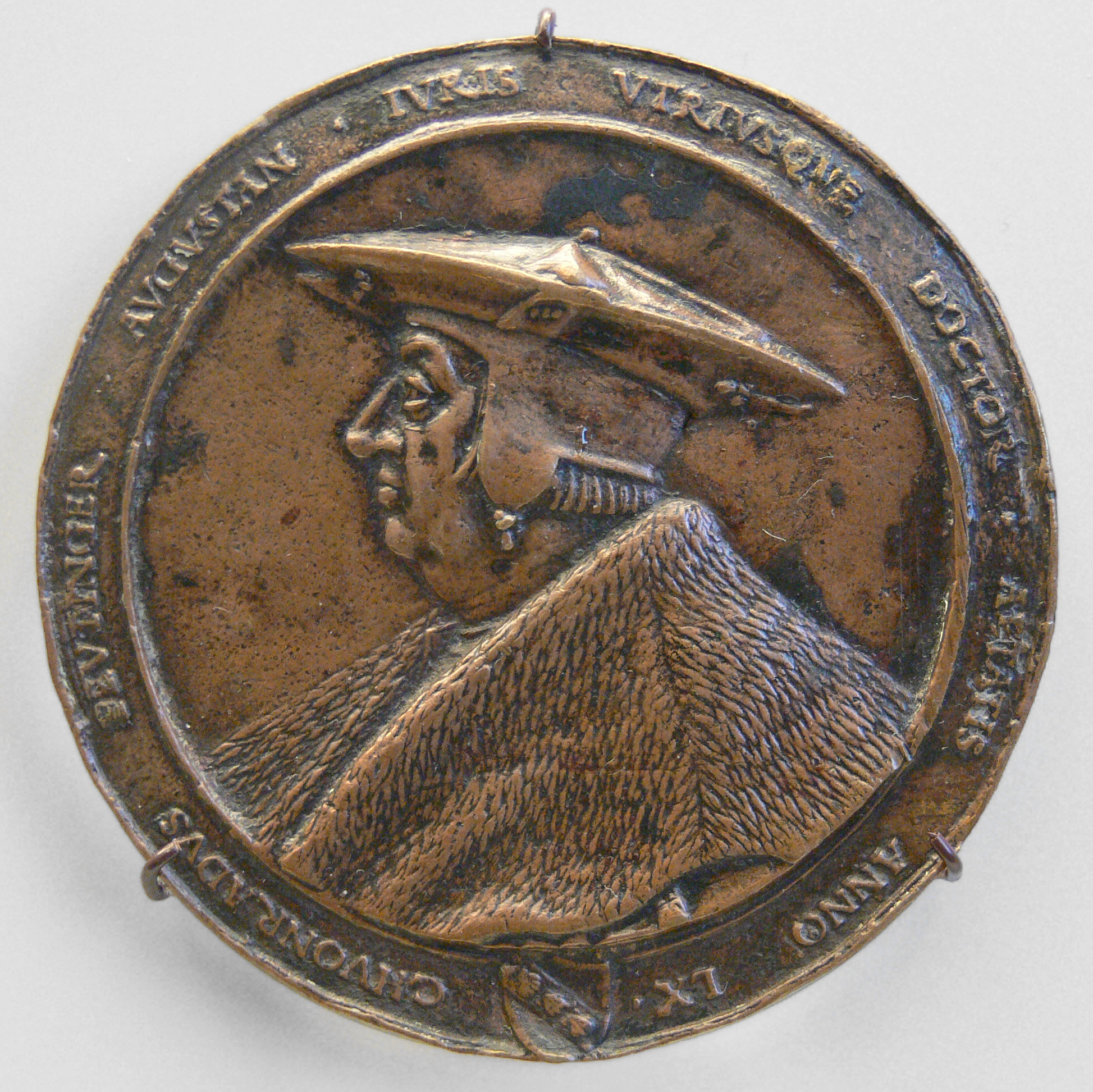 de: Friedrich Hagenauer: Bildnis des Konrad Peutinger; Augsburg (?) 1527, Bronze en: Friedrich Hagenauer: Portrait of Konrad Peutinger; Augsburg (?) 1527, bronze Münzkabinett (alter Besitz), Leihgabe an die Skulpturensammlung, Bode-Museum Berlin Münzumschrift / inscription of coin: lat: CHVONRADVS PEVTINGER AVGVSTAN(VS) IVRIS VTRIVSQVE DOCTOR AETATIS ANNO LX lat: CHUONRADUS PEUTINGER AUGUSTAN(US) IURIS UTRIUSQUE DOCTOR AETATIS ANNO LX de: KONRAD PEUTINGER AUS AUGSBURG - DOKTOR BEIDER RECHTE IM 60. LEBENSJAHR en: CONRAD PEUTINGER OF AUGSBURG - DOCTOR OF BOTH LAWS IN THE 60TH YEAR OF (HIS) AGE